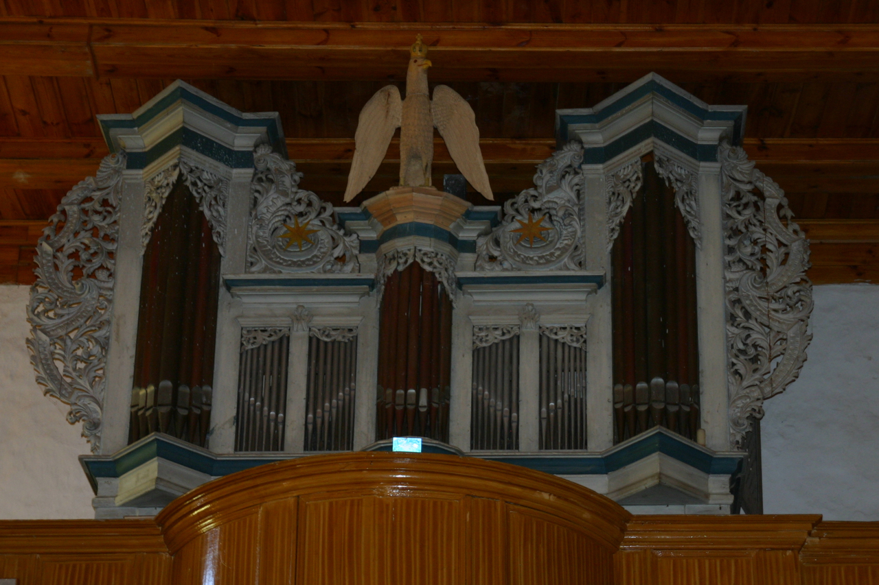 Barciany - wnętrze rzymskokatolickiego kościoła parafialnego p,w. Niepokalanego Serca NMP, 4 ćw. XIV, XVI, XVIII, XIX